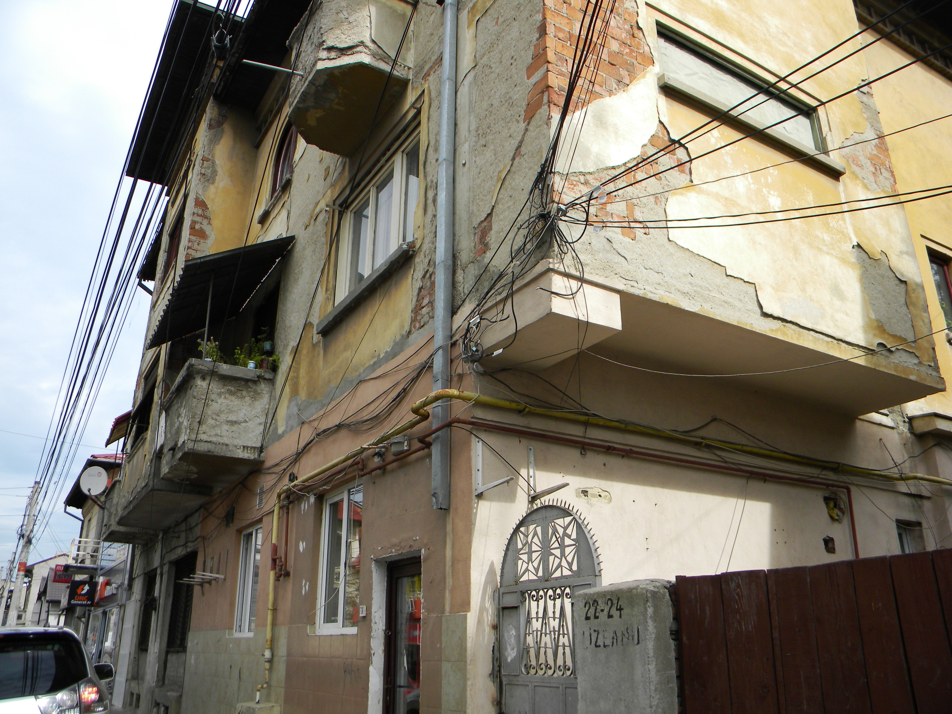 Bucuresti, Romania, Casa pe Str. Lizeanu nr. 22-24, sect. 2